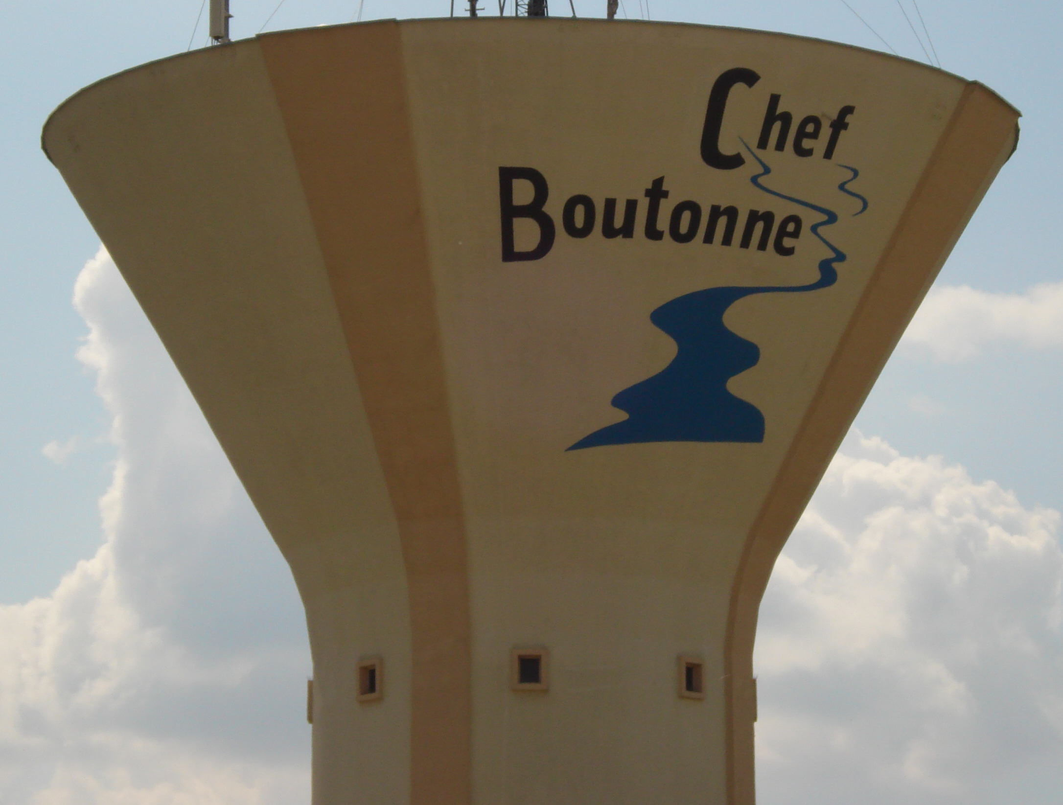 Le château d'eau de Chef Boutonne